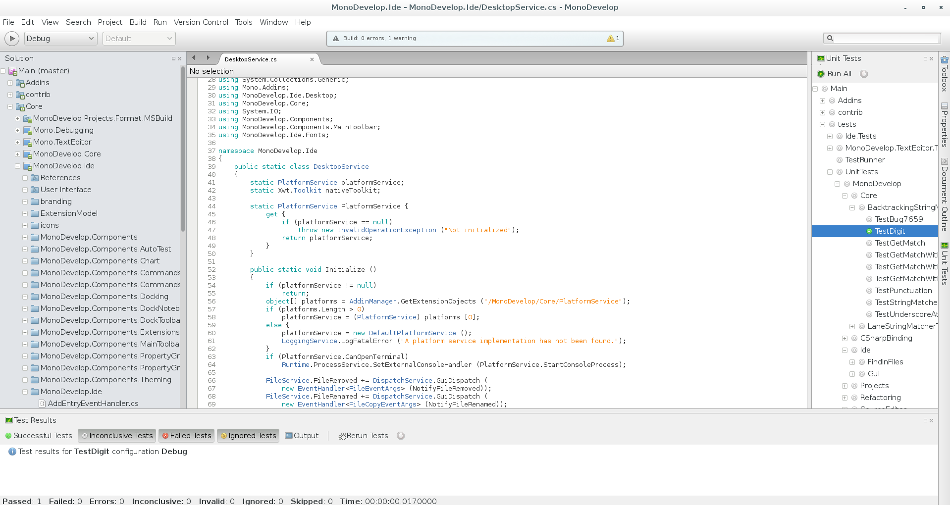 Screenshot von MonoDevelop in der Version 5.4